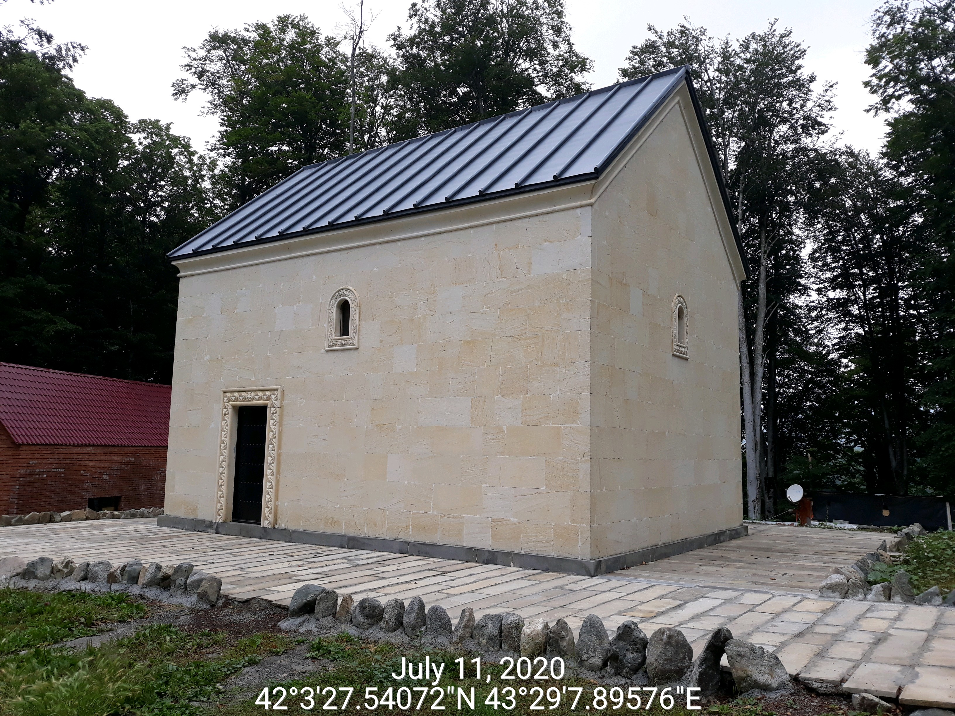 ქუცუმის წმინდა გიორგის ეკლესია